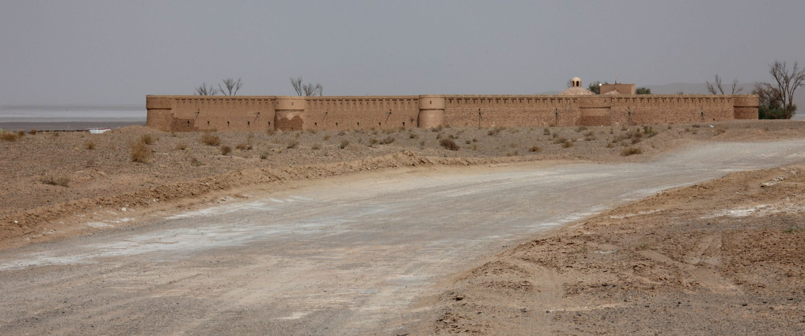 Caravanserai in Maranjab, Dasht-e Kavir